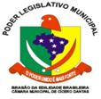 Brasão Câmara Municipal de Cícero Dantas